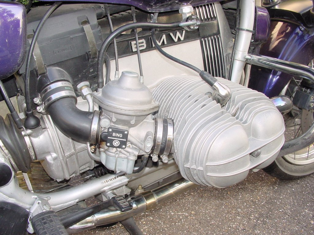 BMW R100R Roadster